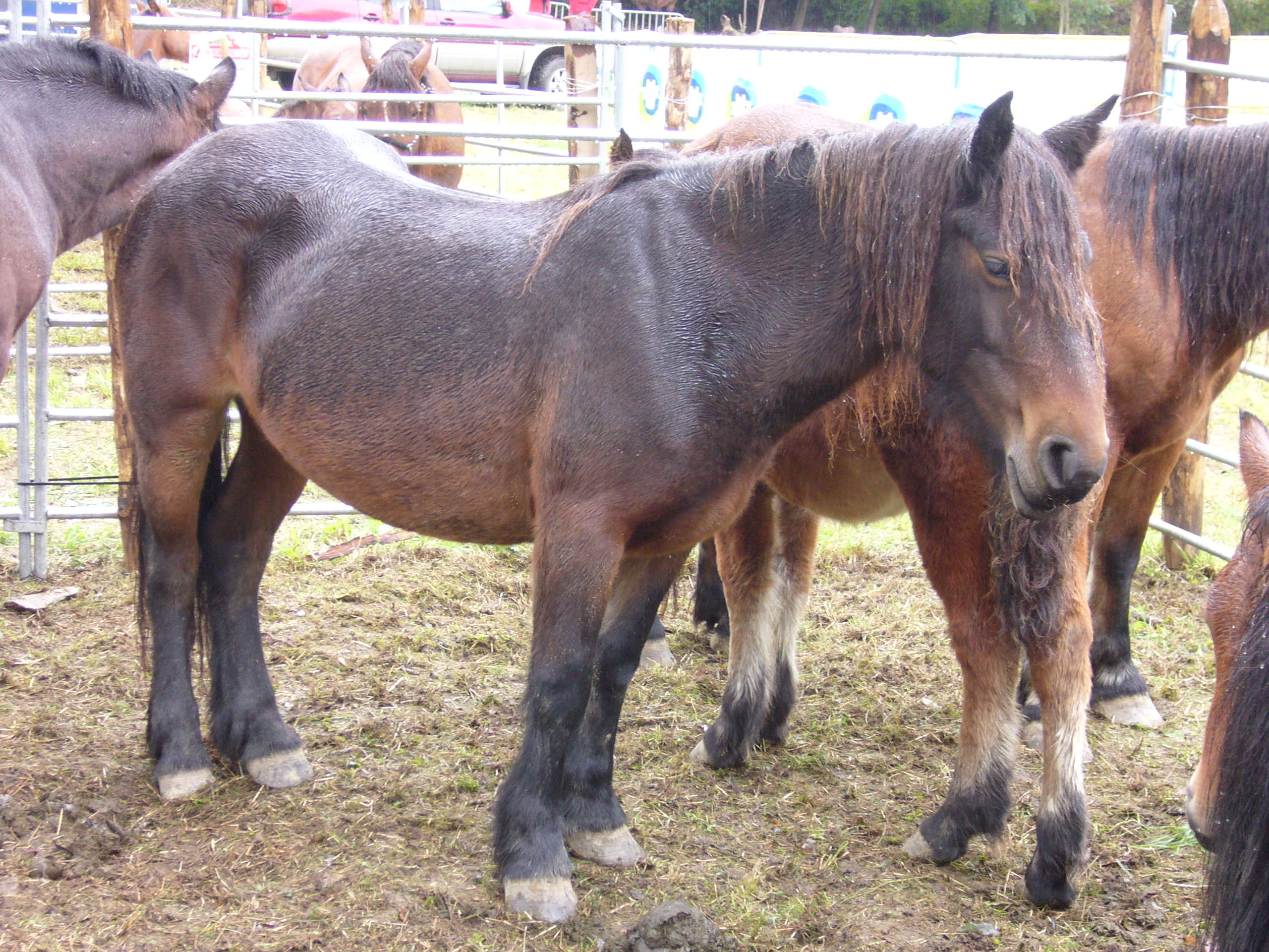 Nafar behoka, zaldia